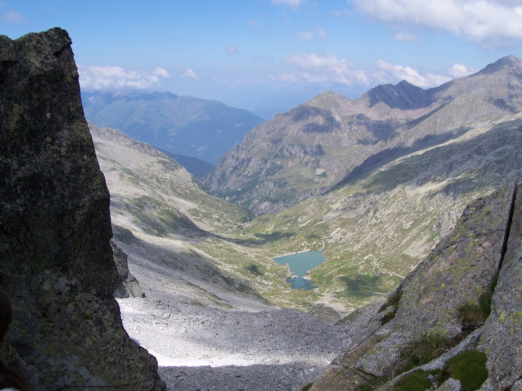 Val Miller, Val Camonica, Italia